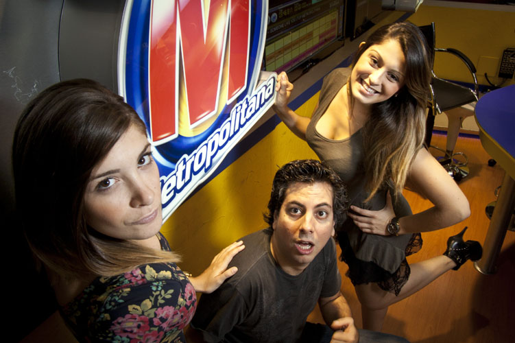 SAO PAULO, SP, BRASIL, 23-03-2012, 16h00: da esquerda para direita: Aline Costa (a Vicky), 24, Marcelo Barbur, 35 e Amanda Bello (a Barbie)apresentadores do Programa Chupim da Radio Metropoitana. (Foto: Ze Carlos Barretta/Folhapress AGO-SHOW)